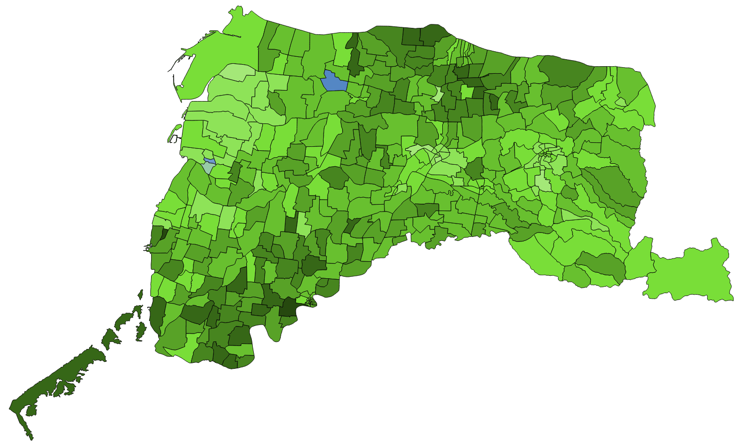 中文（台灣）: 顏色對照表